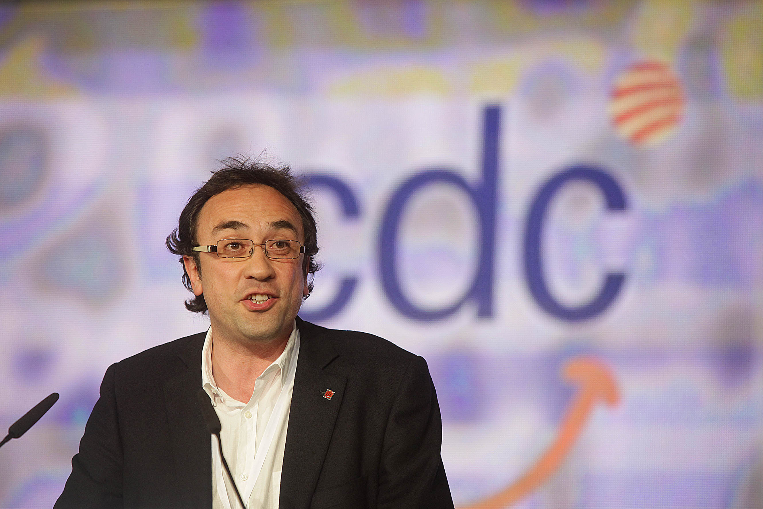 24.03.2012, Reus 16è Congrés de Convergència Democràtica de Catalunya a Reus. Presentació Candidatura a la Direcció Nacional. Josep Rull. Foto: CDC/Jordi Play